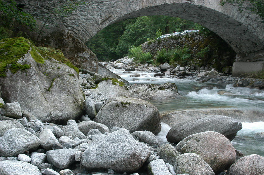 Ponte sul torrente Masino